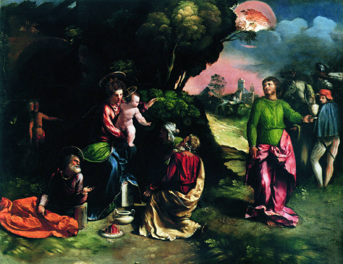 Доссо Досси. Поклонение волхвов. Ок. 1520. Лондон, Национальная галерея